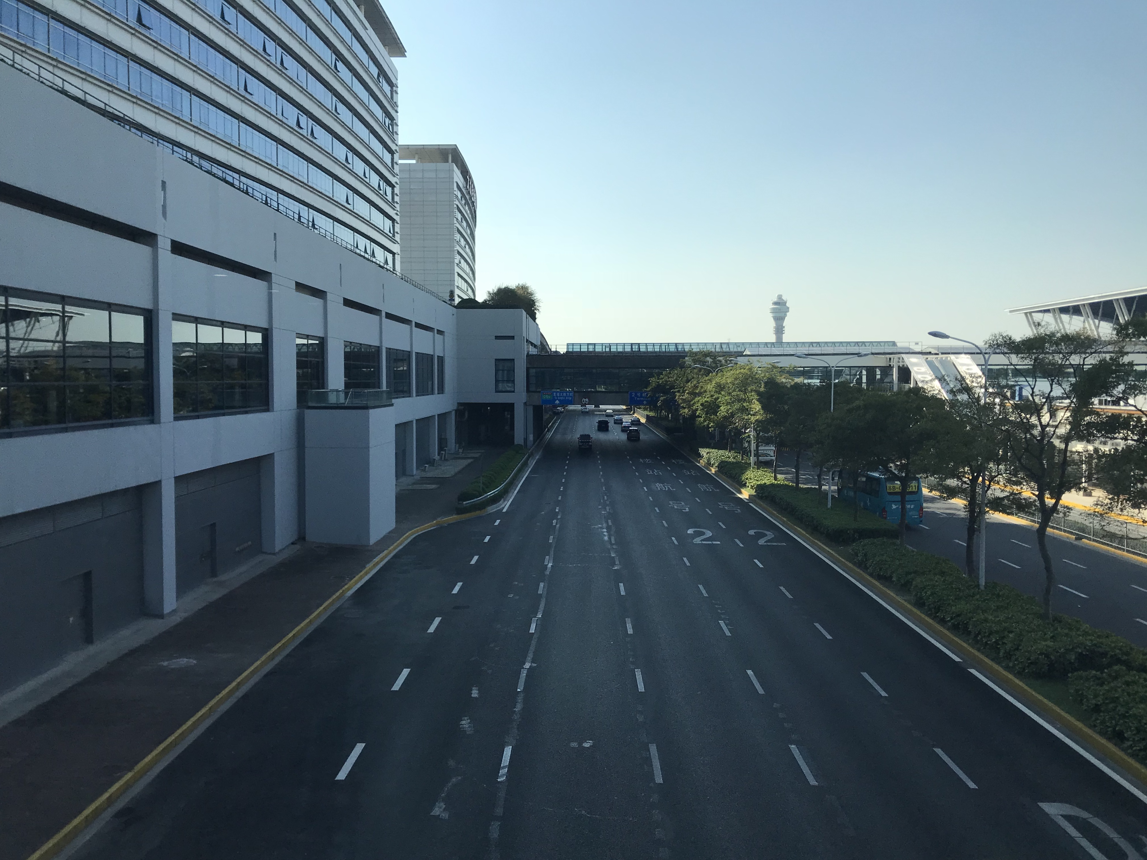 上海浦東国際空港の迎賓高速道路